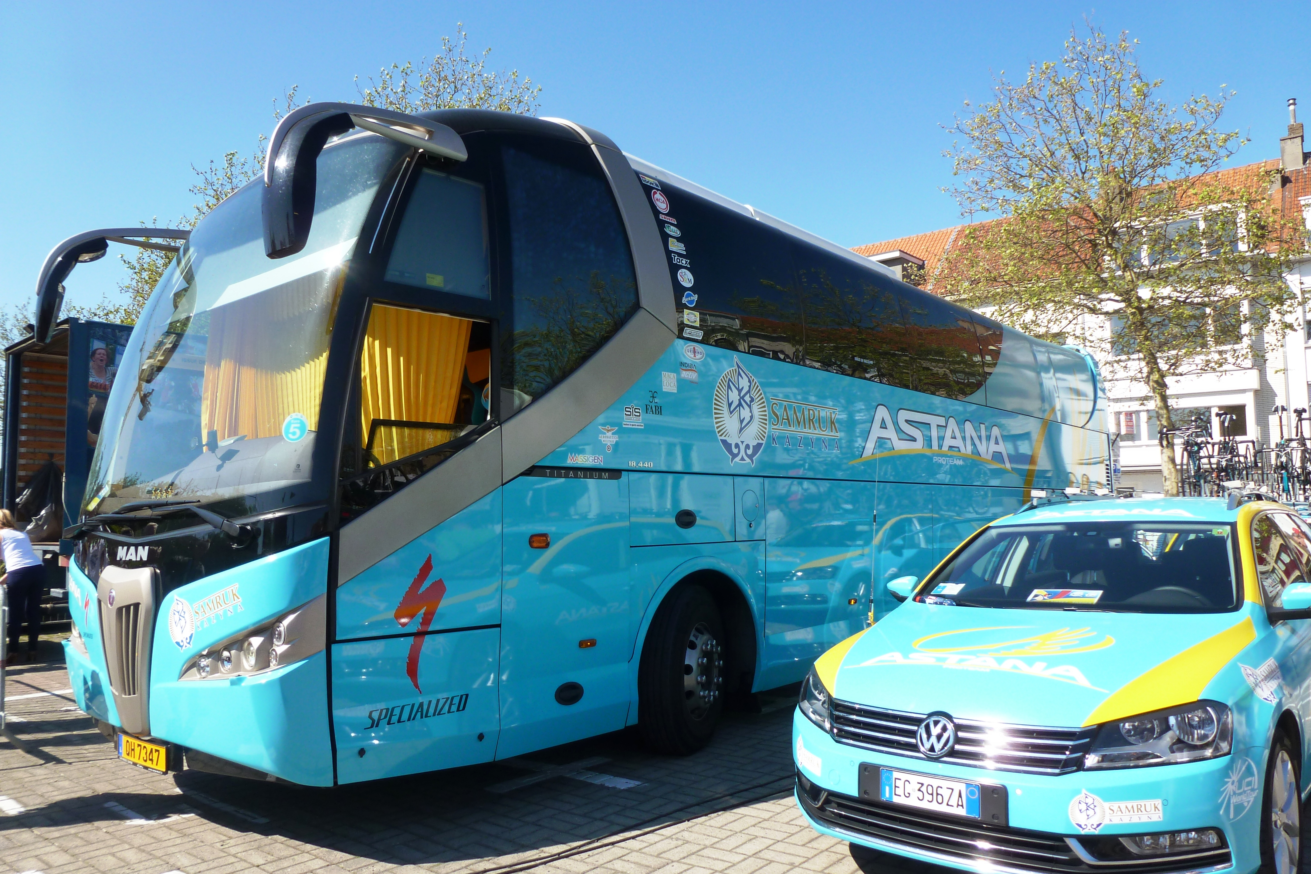 Auto des Radsportteams Astans 2012